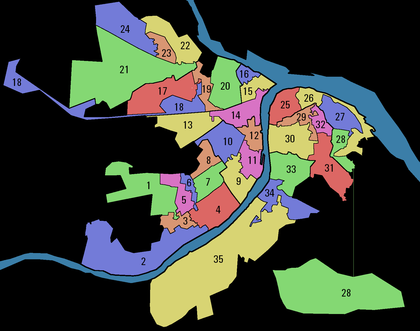 схема избирательных округов на выборах депутатов Городской Думы города Нижнего Новгорода 7 созыва